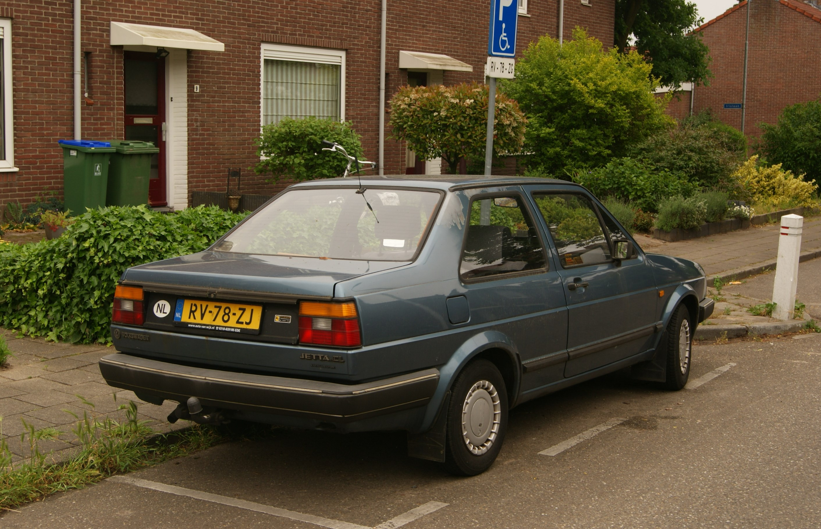 RV-78-ZJ